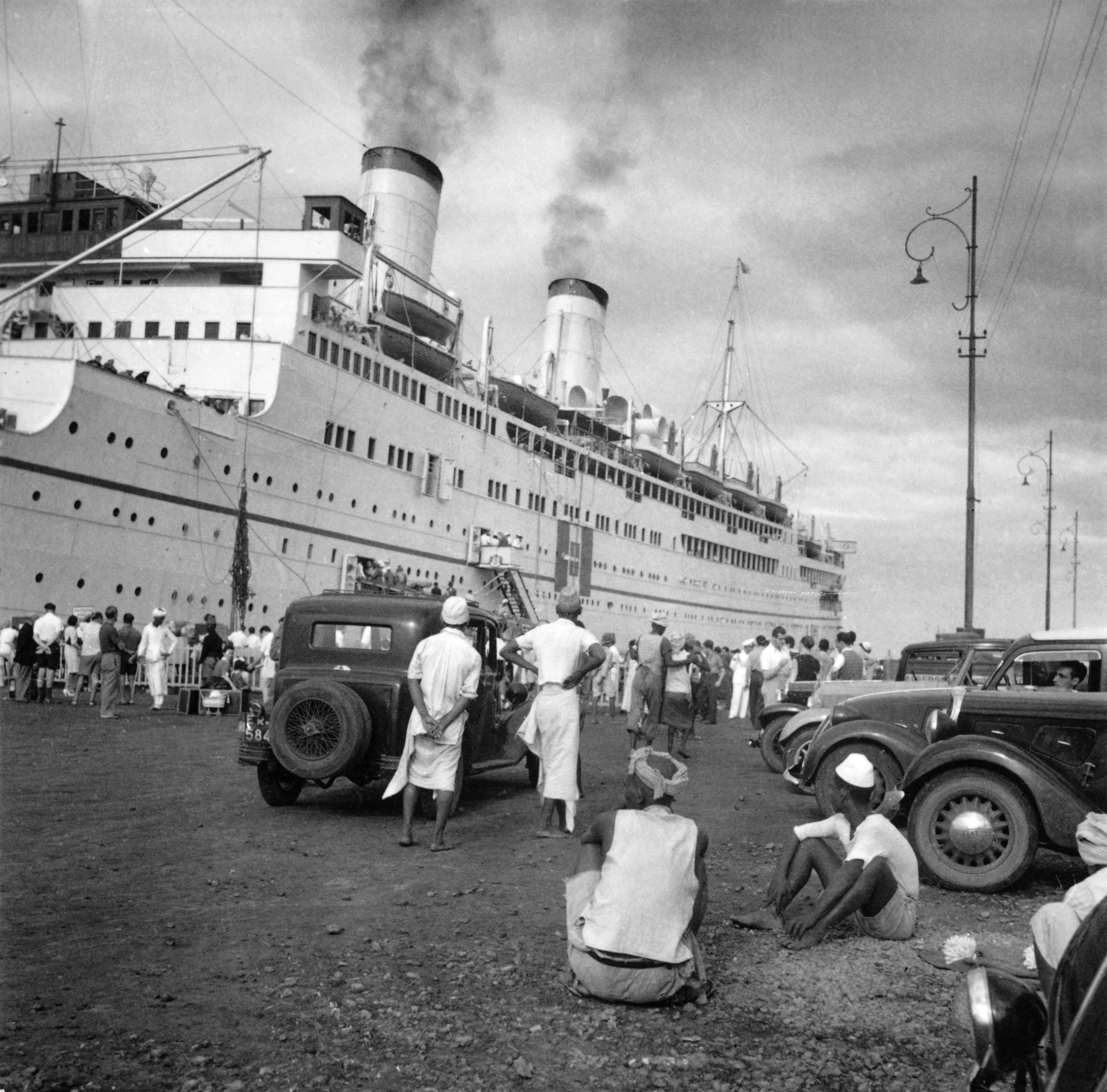 Italienisch-Ostafrika, Massana (Massawa, Massaua): Hafen; Wartende Menschen am Quai vor dem Schiff